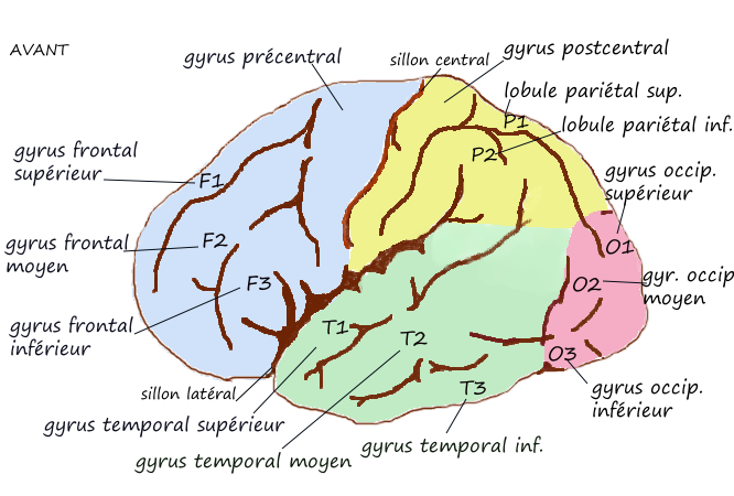 Principaux gyrus de la face externe de l'hémisphère gauche